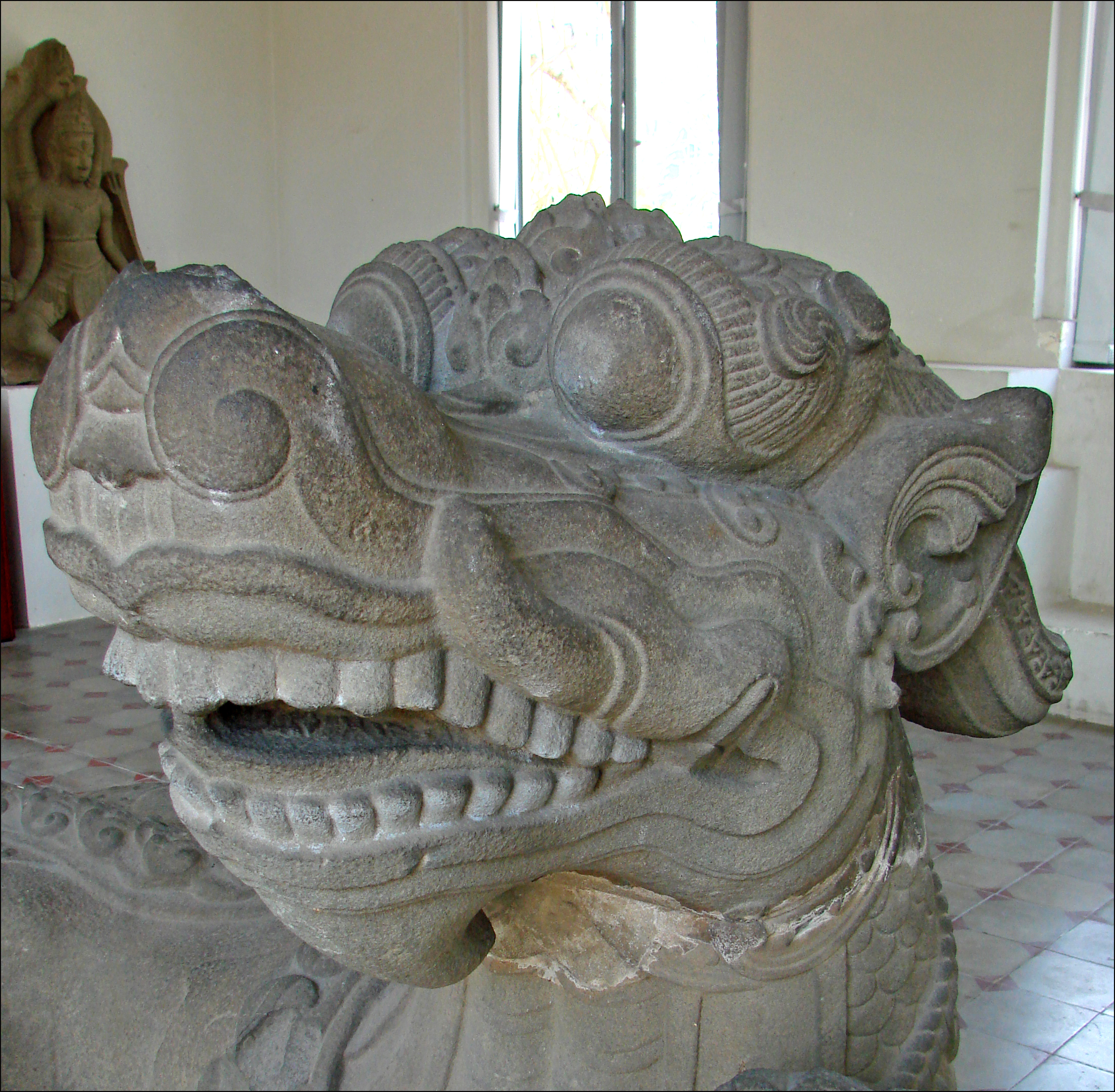 Tête de Dragon couché Style de Thap mam XIIè siècle Grès Construit par l’École Française d’Extrême-Orient en 1915, le musée fut initialement baptisé Musée Henri Parmentier (nom de l’un des premiers explorateurs des sites du Royaume du Champa). Les oeuvres sont classées par provenance et par période, ce qui permet de suivre, de salle en salle, l’évolution de l’art cham au niveau de la sculpture. La majorité des objets proviennent des sites de Tra Kieu (ancienne capitale administrative du Royaume du Champa), de My Son, de Dong Duong (centre bouddhiste) et de Thap Man.